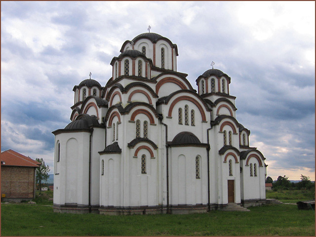 Serbian Orthodox Church in Veternik, near Novi Sad, Vojvodina (Serbia) L'église orthodoxe serbe de Veternik, près de Novi Sad, Voïvodine (Serbie)